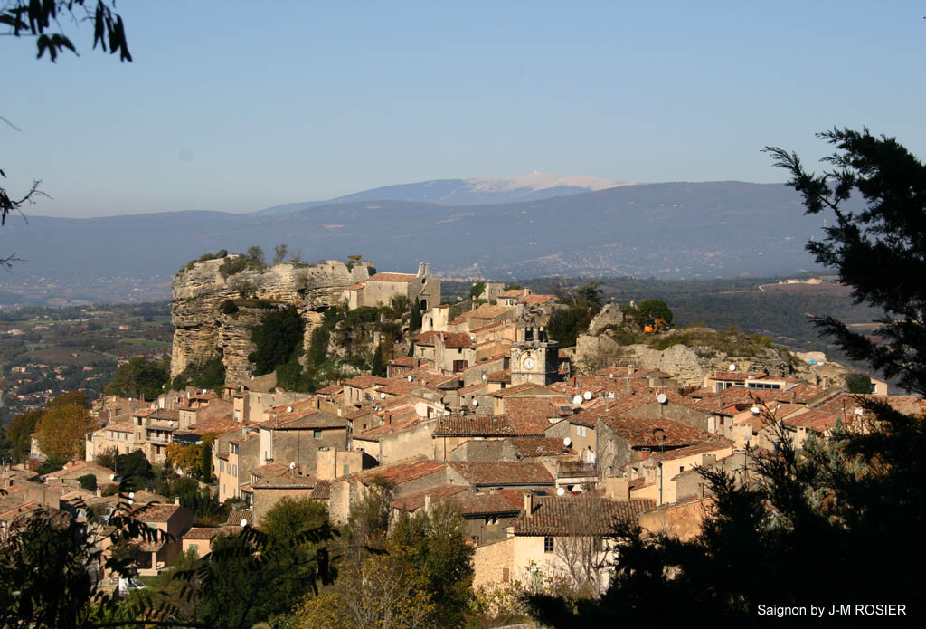 village of Saignon, Vaulcuse, France